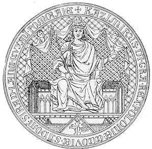 Pieczec Kazimierza Wielkiego